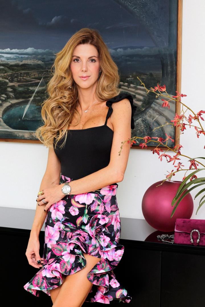 Sesión de fotos de la diseñadora de moda Carol Ginter realizada en Caracas, Venezuela.